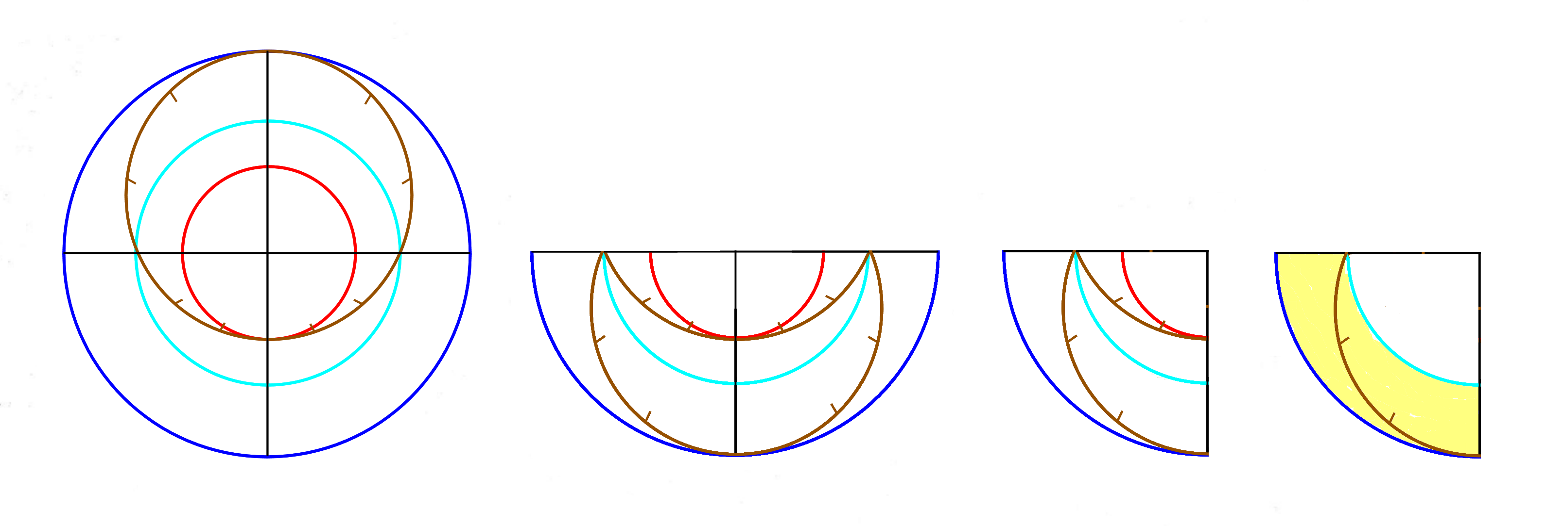 Projection stéréographique de l'astrolabe au quadrant de Gunter.